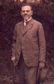 Johann Polach (1871-1942) český učitel a politik